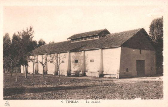 Carte postale représentant le casino des fleurs de Tinja (aujourd'hui Tinja) avant qu'il soit transformé en église en 1924